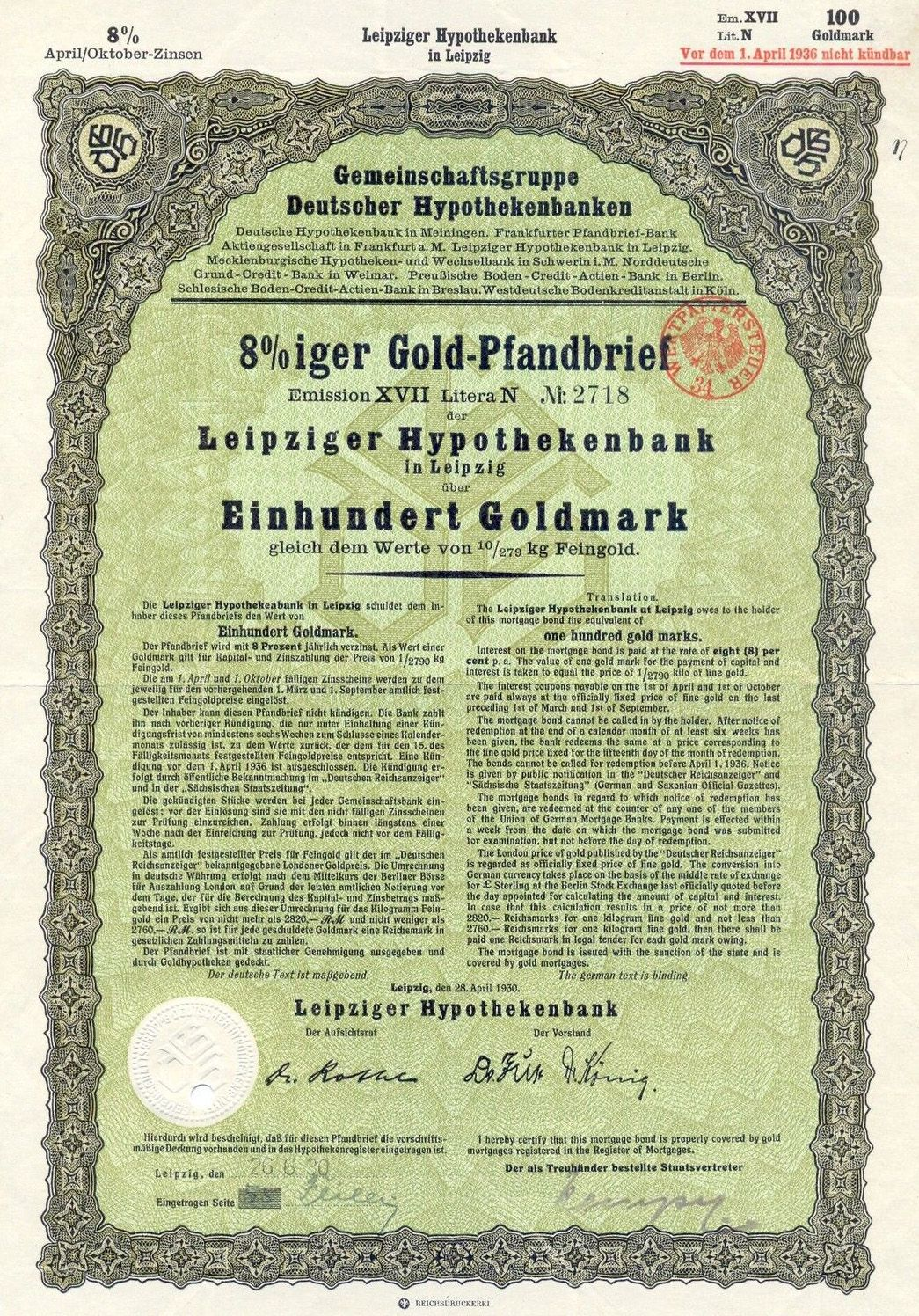 Pfandbrief der Leipziger Hypothekenbank über 100 Goldmark mit Unterschrift von Karl Rothe als Aufsichtsrat